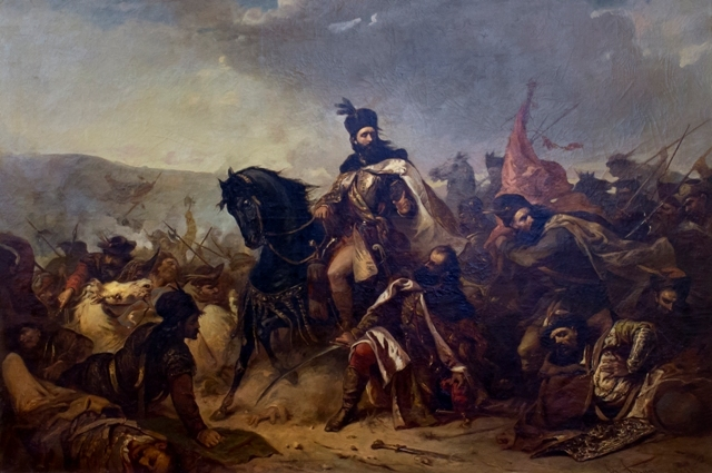 Stefan cel Mare si Aprodul Purice